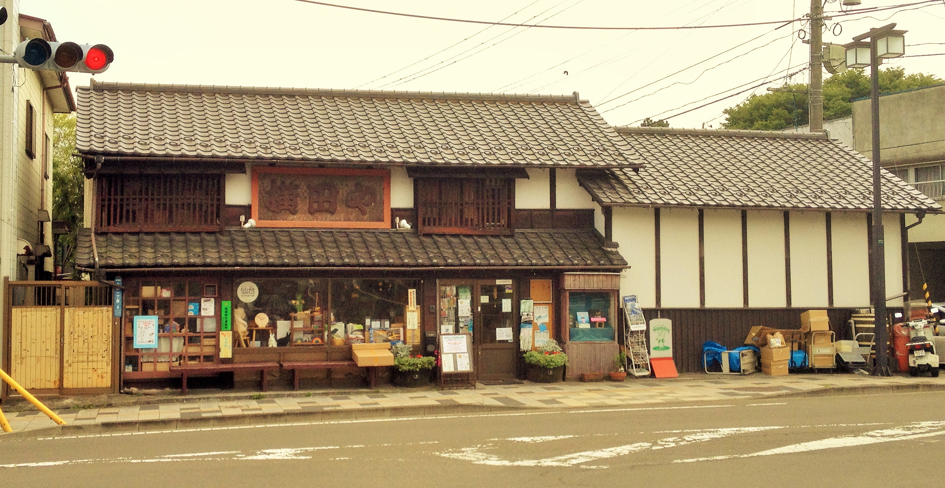 絵本と木のおもちゃ 横田や